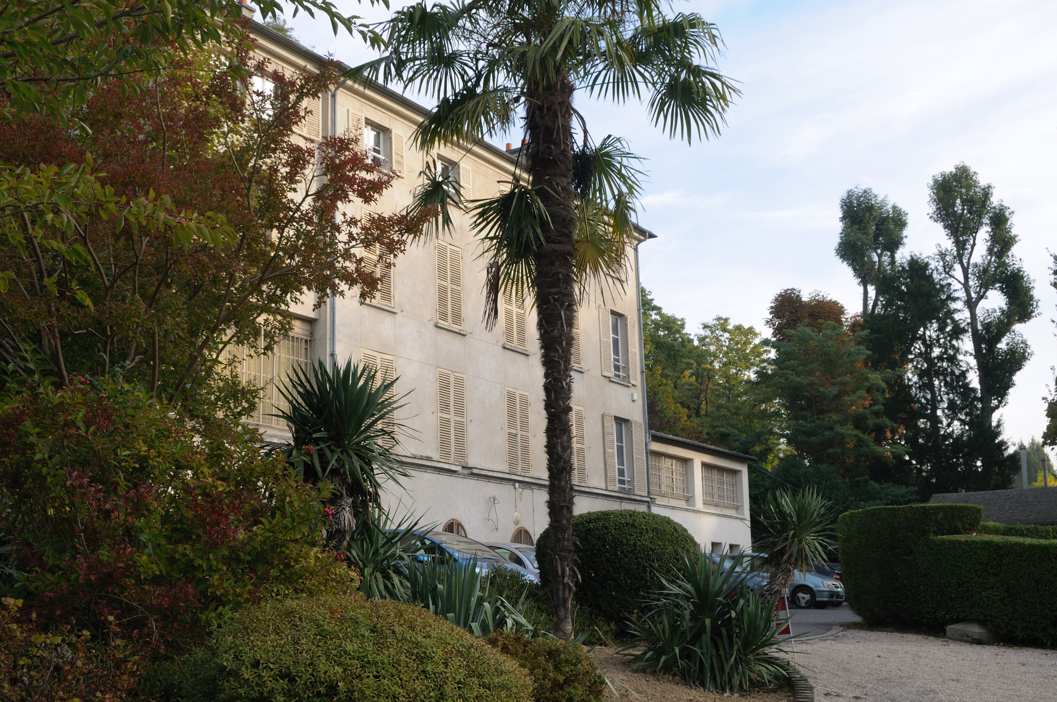 Musée français de la photographie, Bièvres, Essonne, France